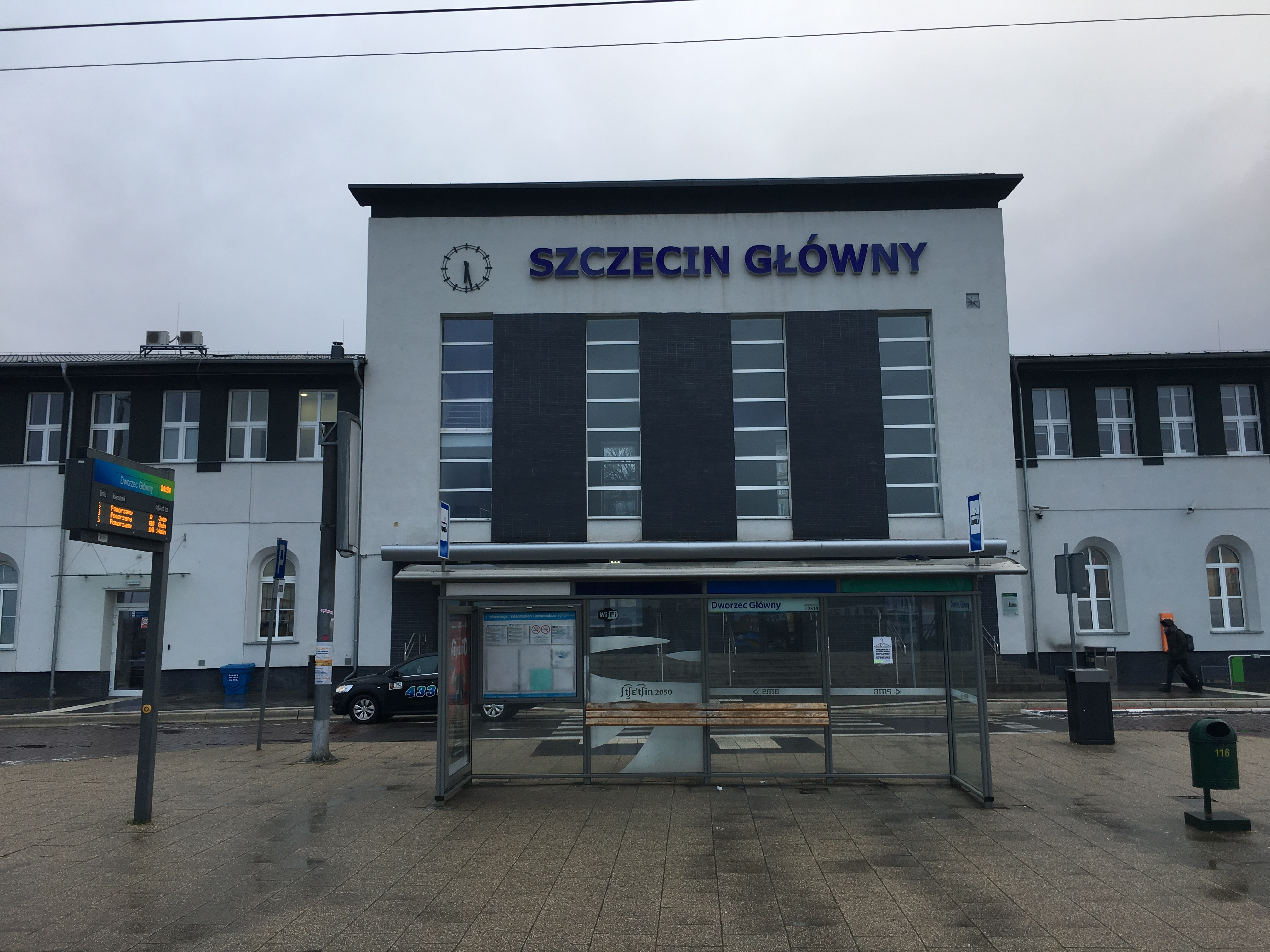 Bahnhosgebäude